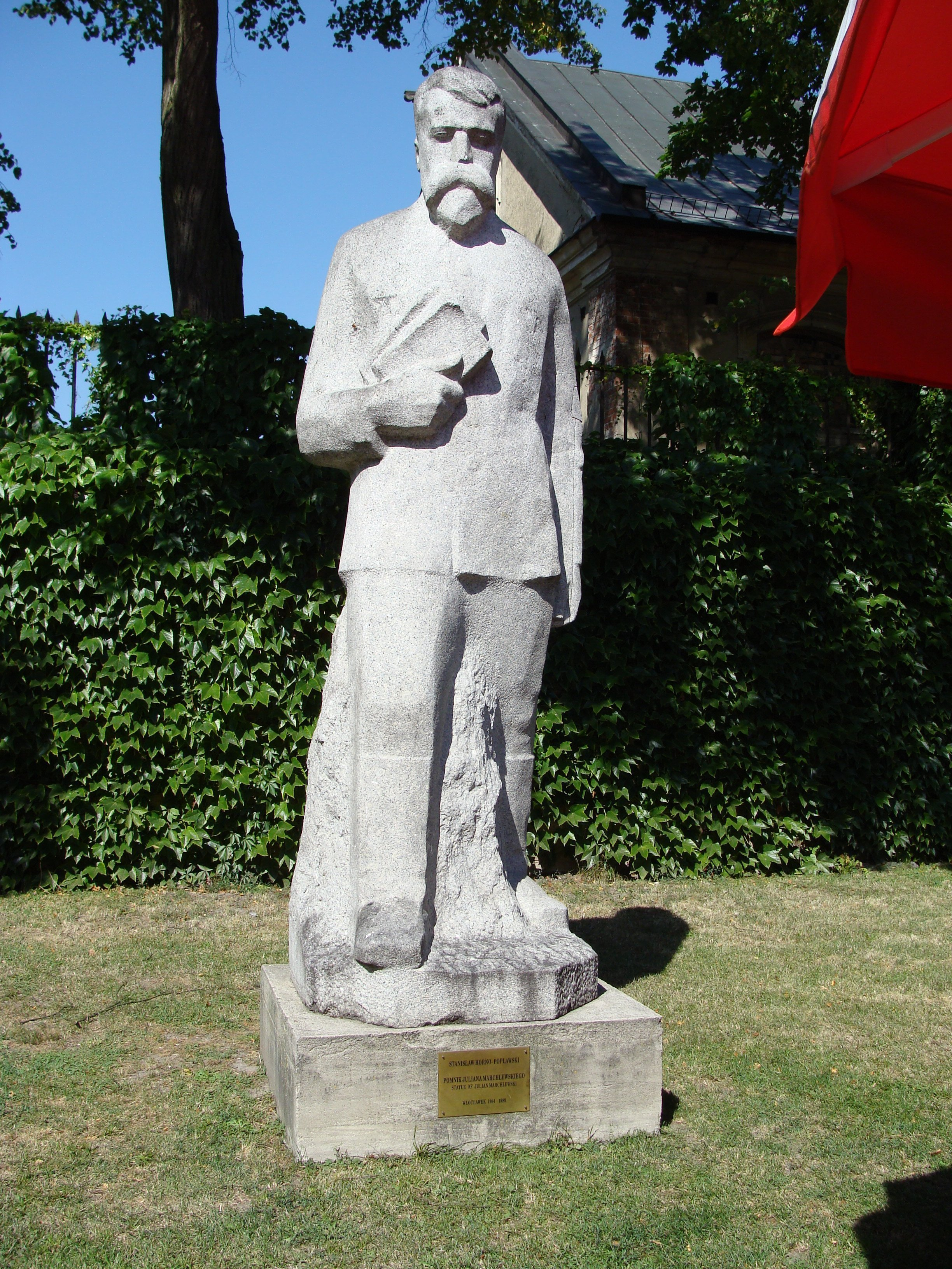 Julian Marchlewski, patron zakładów Celulozowych we Włocłwaku rozsławionych Pamiątką z celulozy Igora Newerlego